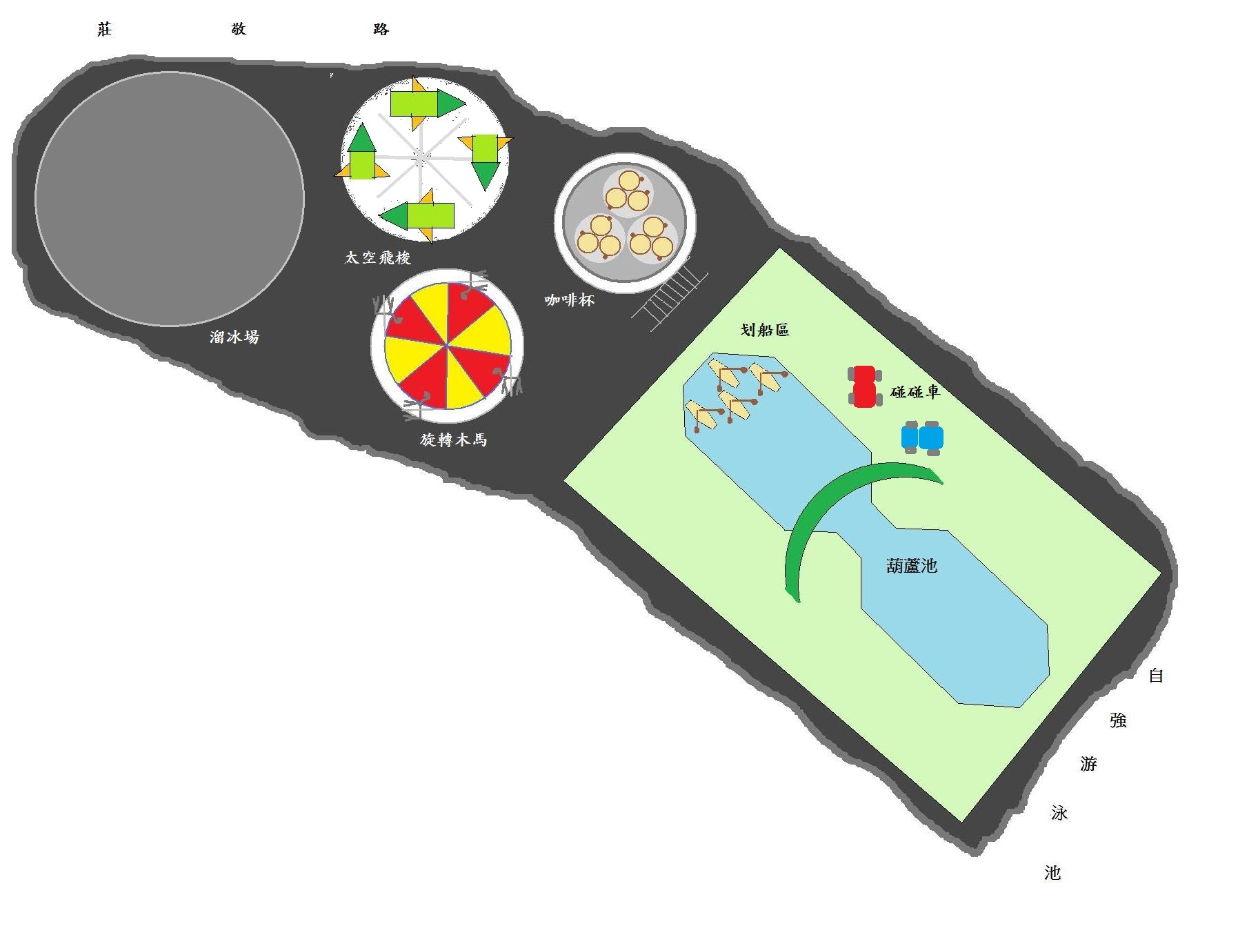 台北縣中和市綜合遊樂場示意圖。